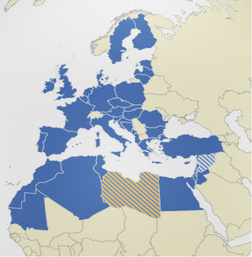 Carte actualisée des membres de l'UpM en 2015